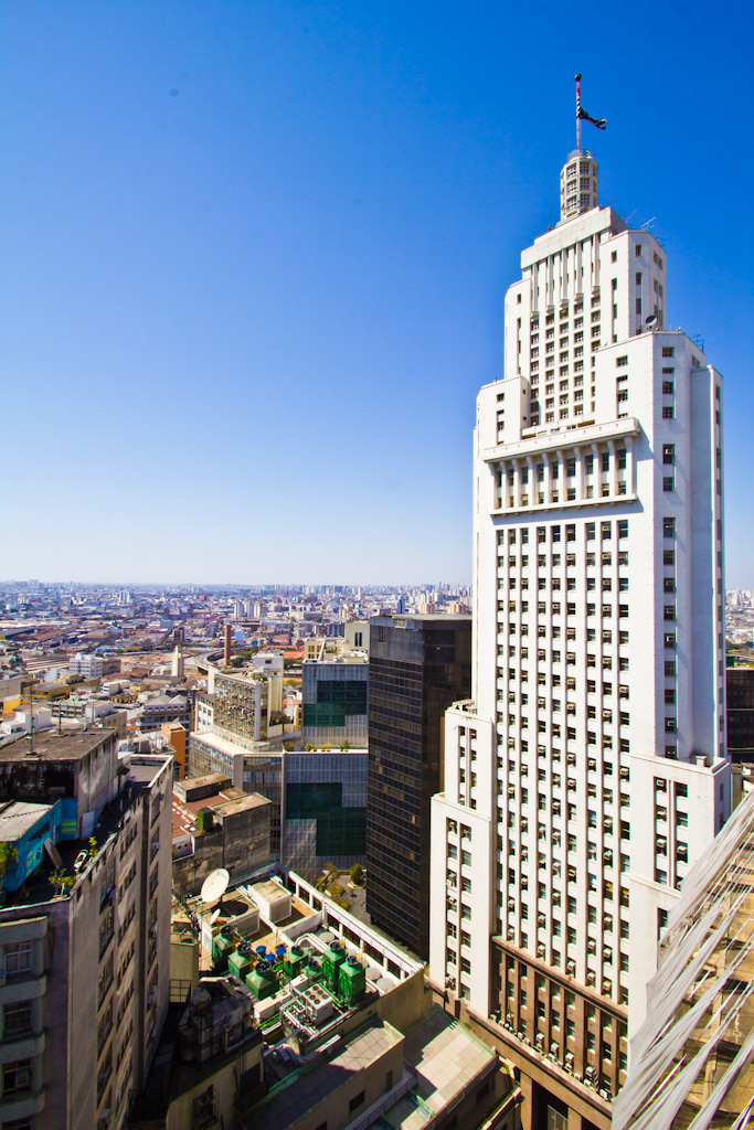 Edifício Altino Arantes, São Paulo, Brasil.